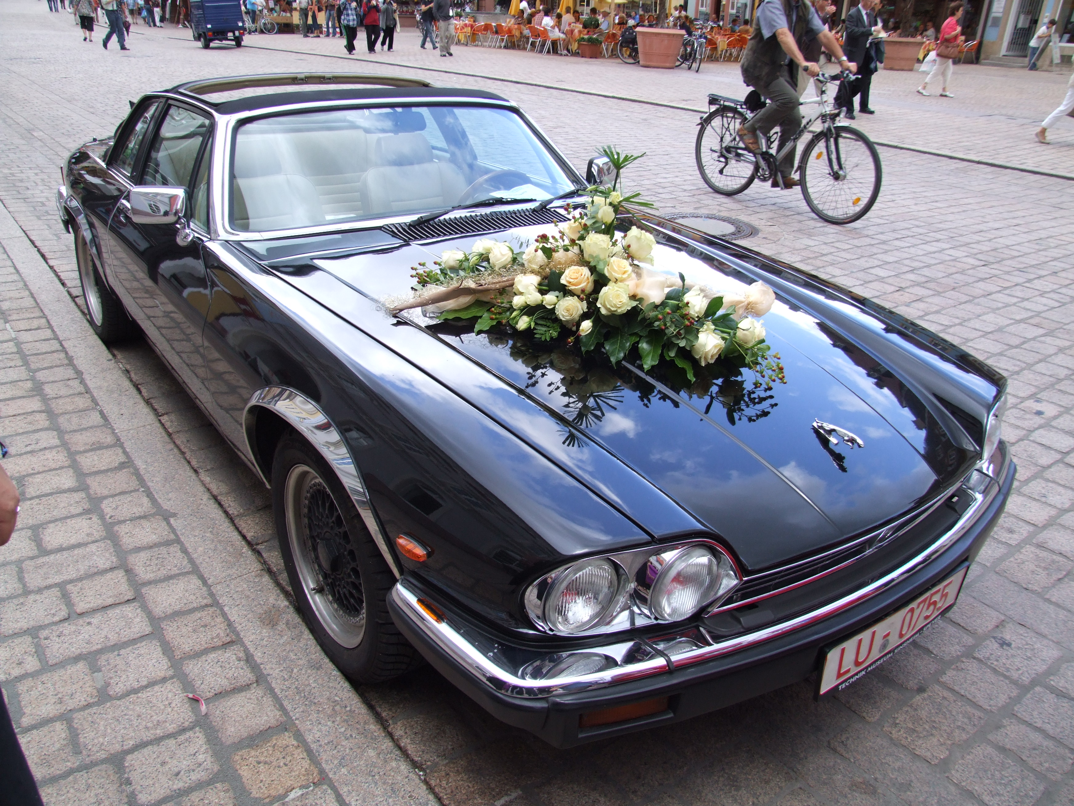 Jaguar XJ-SC